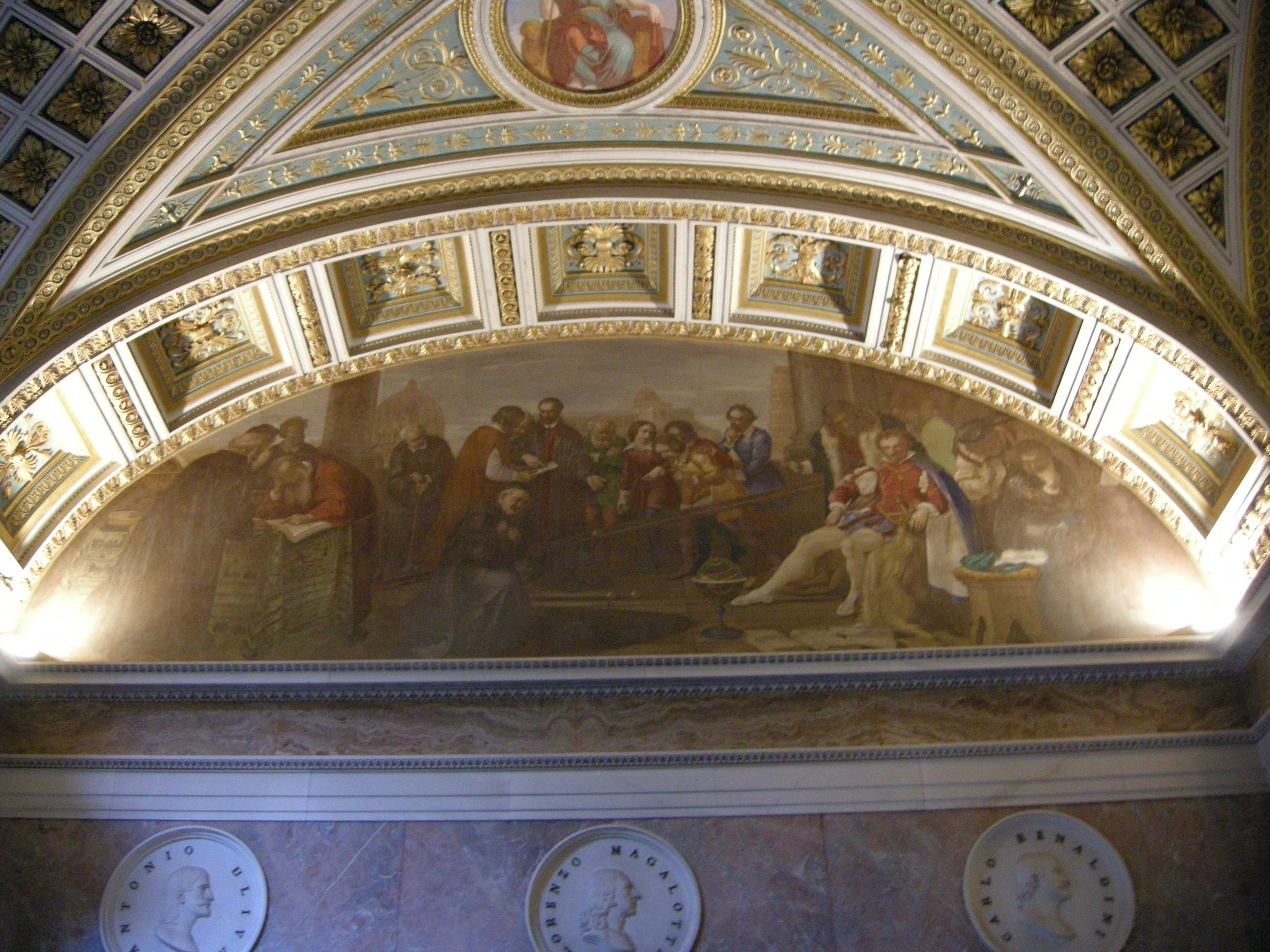 Tribuna di galileo, affreschi